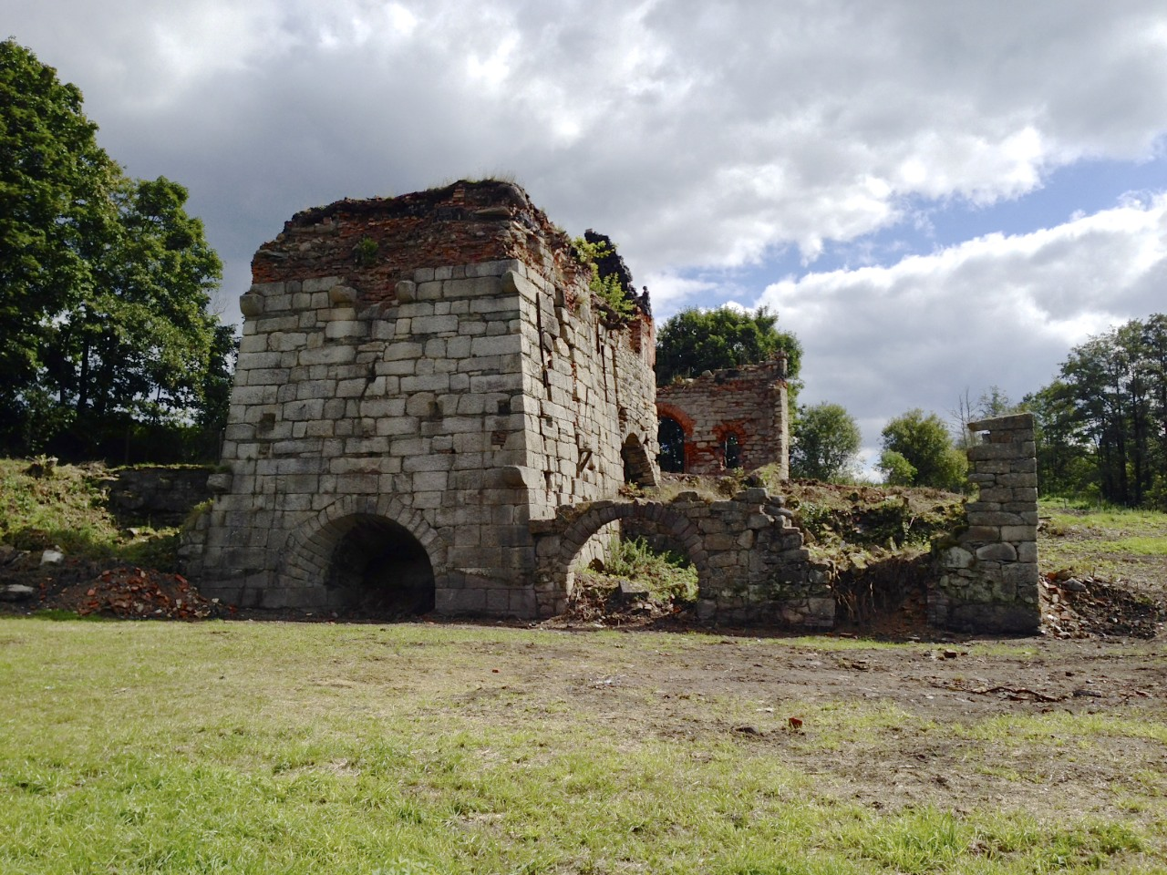 Stará huť v Šindelové, pohled od SZ na vysokou pec.